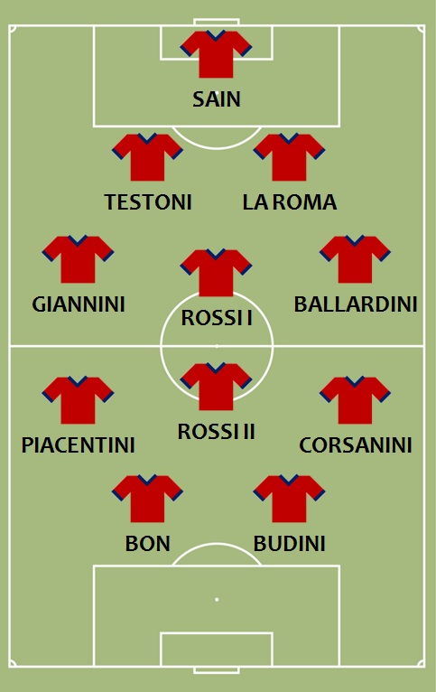 Formazione della A.S. Aquila nello spareggio con l'Andrea Doria (campionato di Prima Divisione 1933-1934).